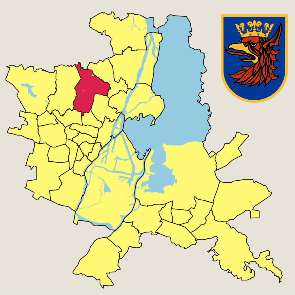 Osiedle "Warszewo" w Szczecinie – jednostka pomocnicza miasta w 2010